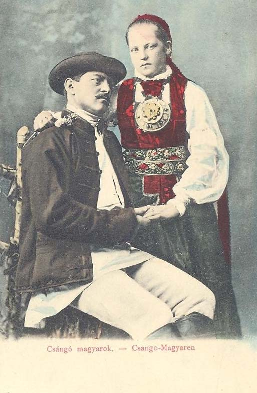 Pereche de ceangăi din Ţara Bârsei.